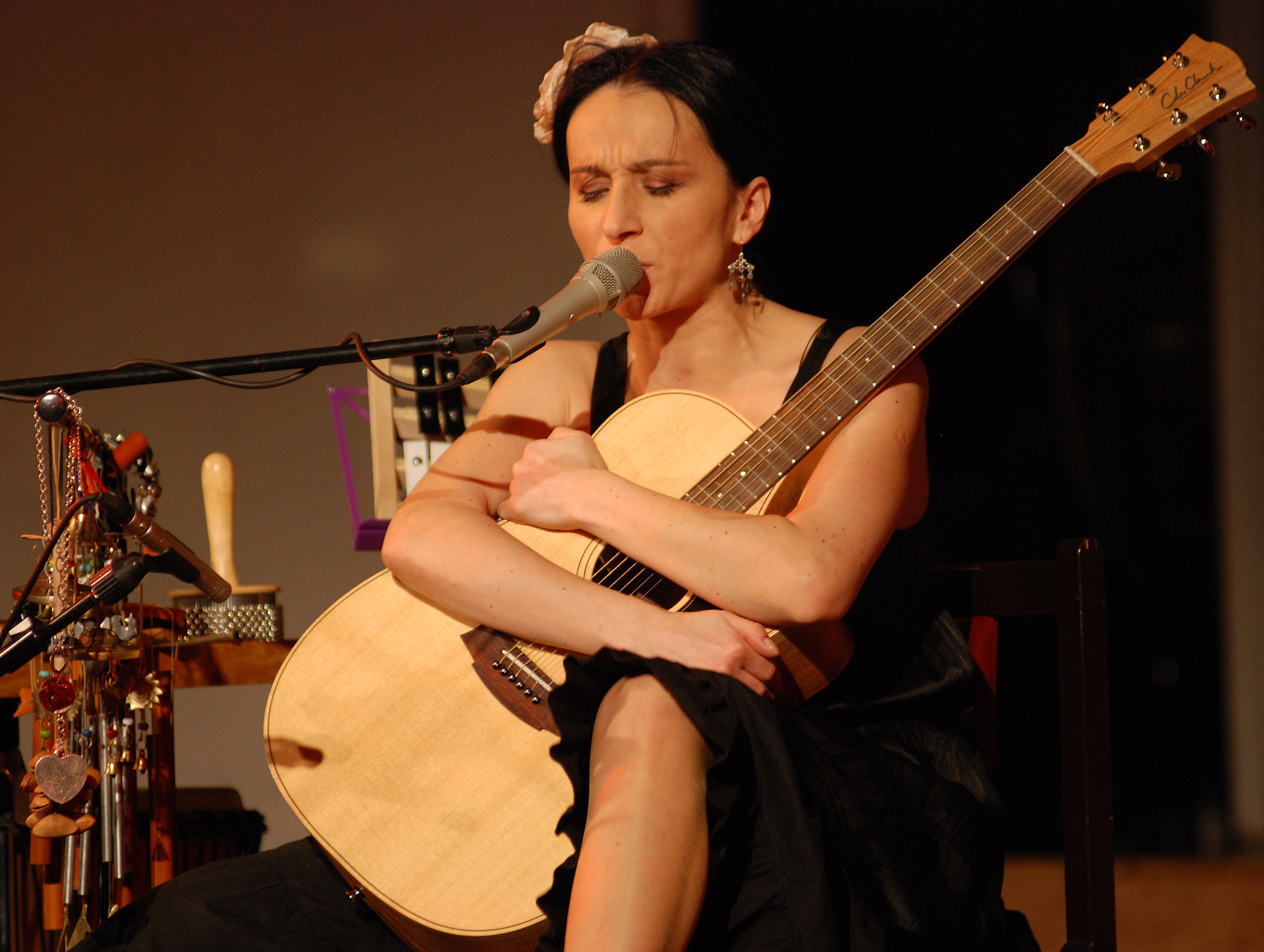 Koncert Renaty Przemyk Akustik Trio w Filharmonii Śląskiej w Katowicach